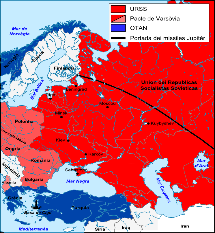 Teatre turc de la crisi dei missiles de Cuba. Fons de carta : Soviet_Union_(European_part)_location_map (realizat per Hellerick).